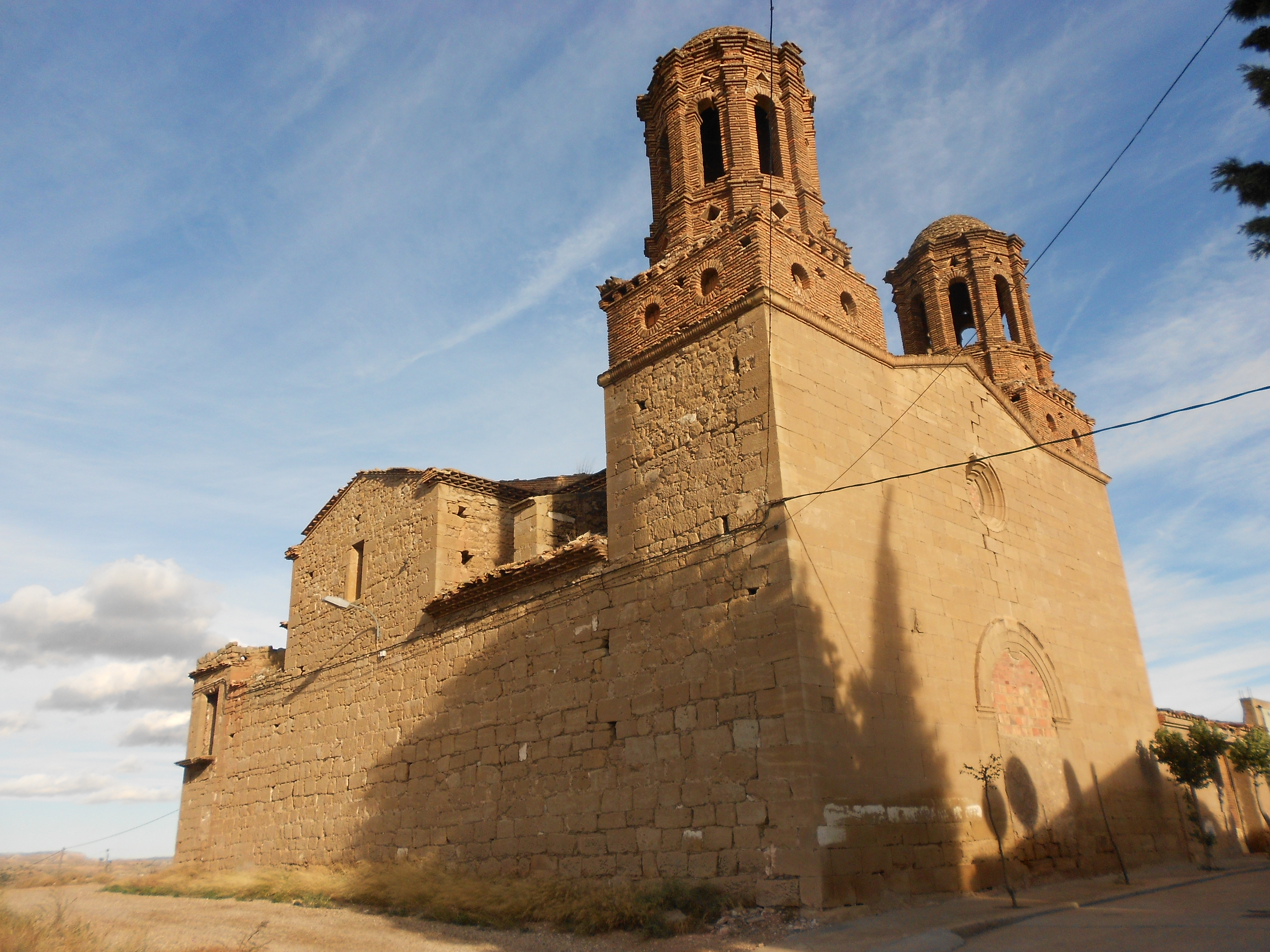 Iglesia de San Javier (Escatrón, Aragón)